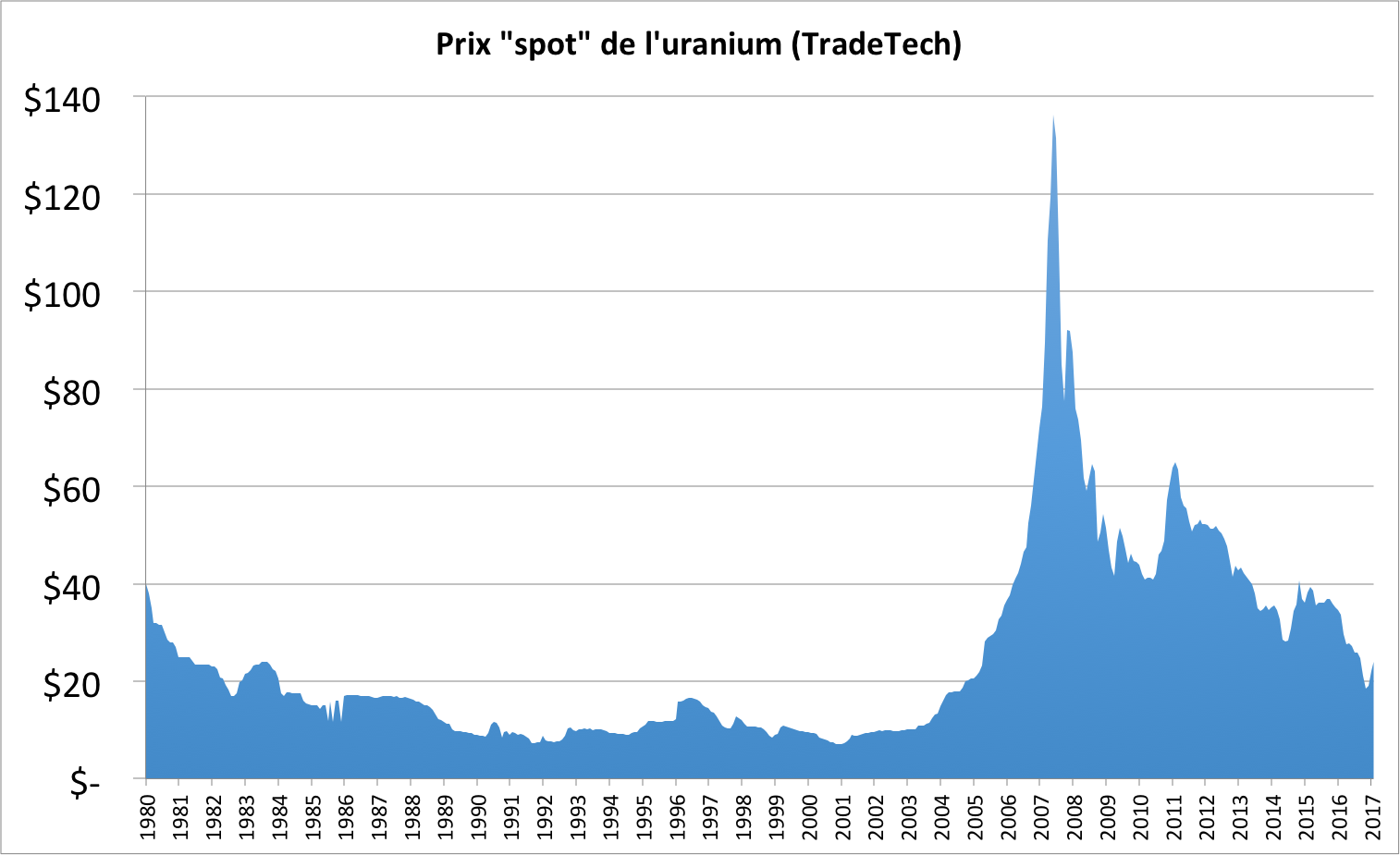 Prix spot de l'uranium en dollars par livre (échantillonnage mensuel) Uranium, NUEXCO, Restricted Price, Nuexco exchange spot, US per pound